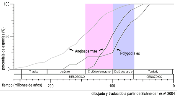 Gráfico que muestra el aumento de la diversidad de helechos polypodiales en relación al aumento de la diversidad de angiospermas, ocurrido durante el Cretácico. Se muestran dos estimaciones de la diversificación de las angiospermas, correspondientes a dos estimaciones diferentes de la edad de los fósiles encontrados pertenecientes a angiospermas (la estimación de la derecha muestra una aplicación "estricta" de la edad de las angiospermas, fijada en 132 millones de años, la de la izquierda muestra una aplicación "relajada" de la edad de las angiospermas, en la que 132 millones de años es el valor mínimo posible). Dibujado y traducido a partir de Schneider et al. 2004.